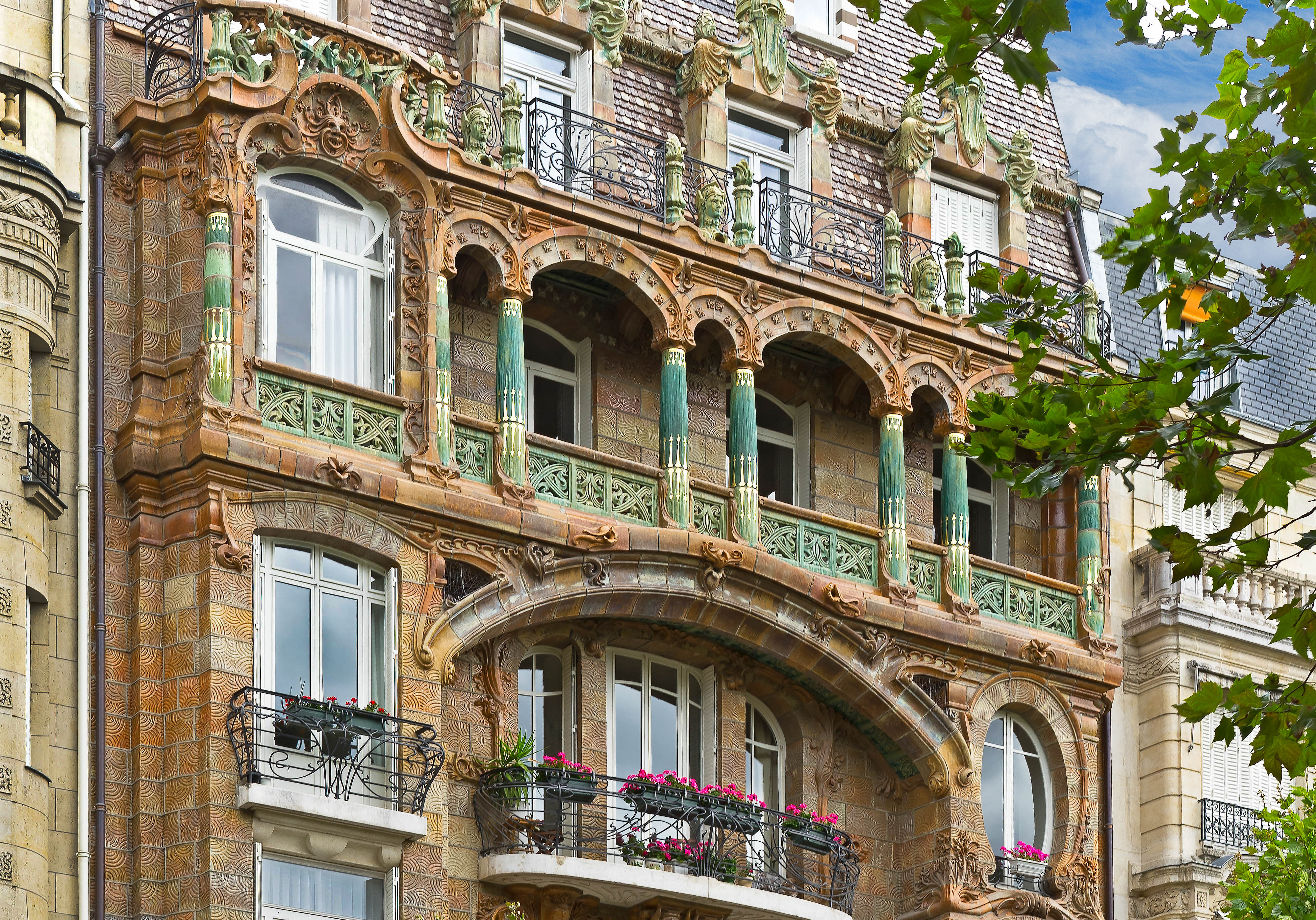 Façade Art Déco